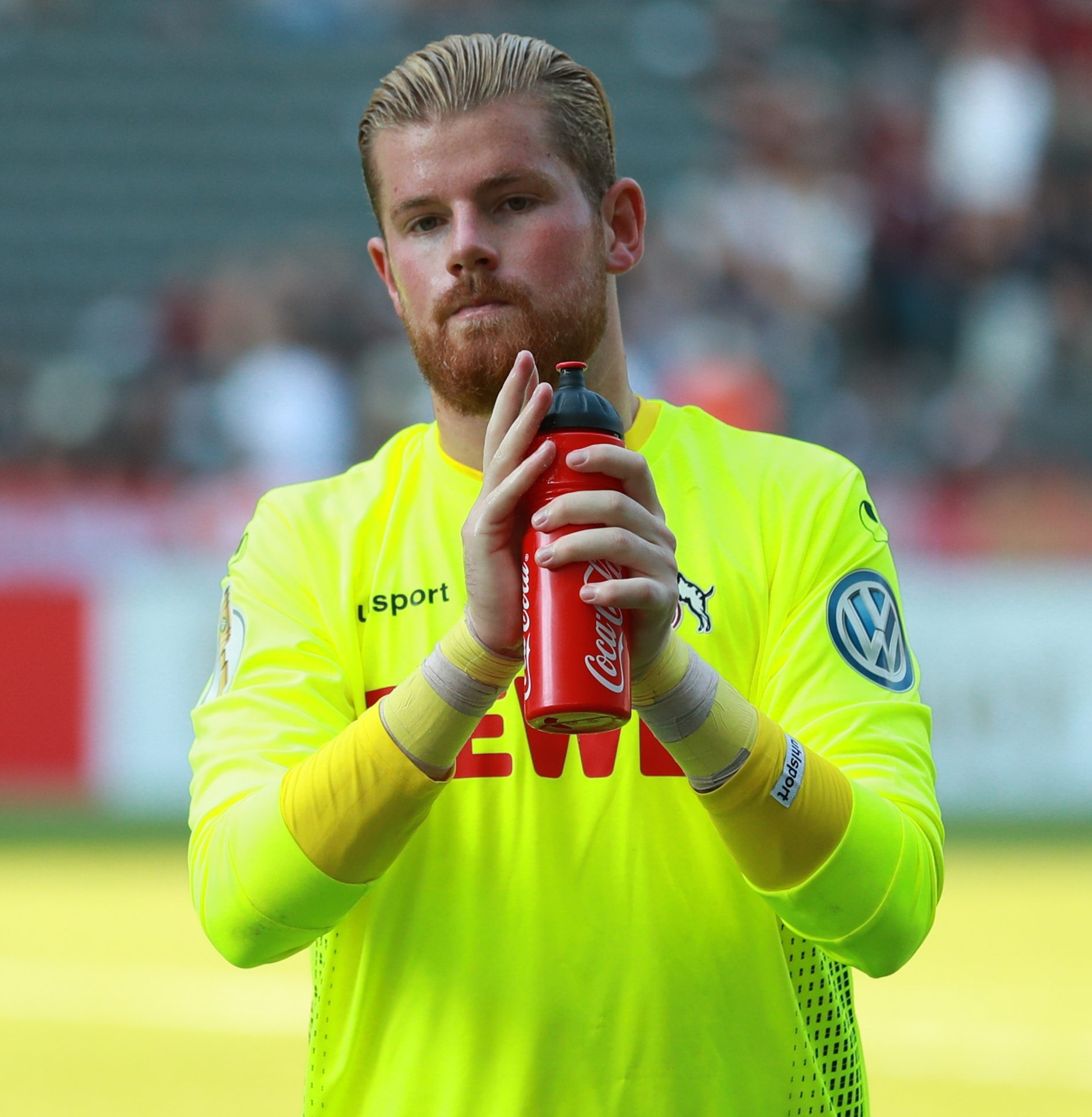 DFB-Pokal 2018/19, 1. Hauptrunde: BFC Dynamo gegen 1. FC Köln 1:9 (1:4)